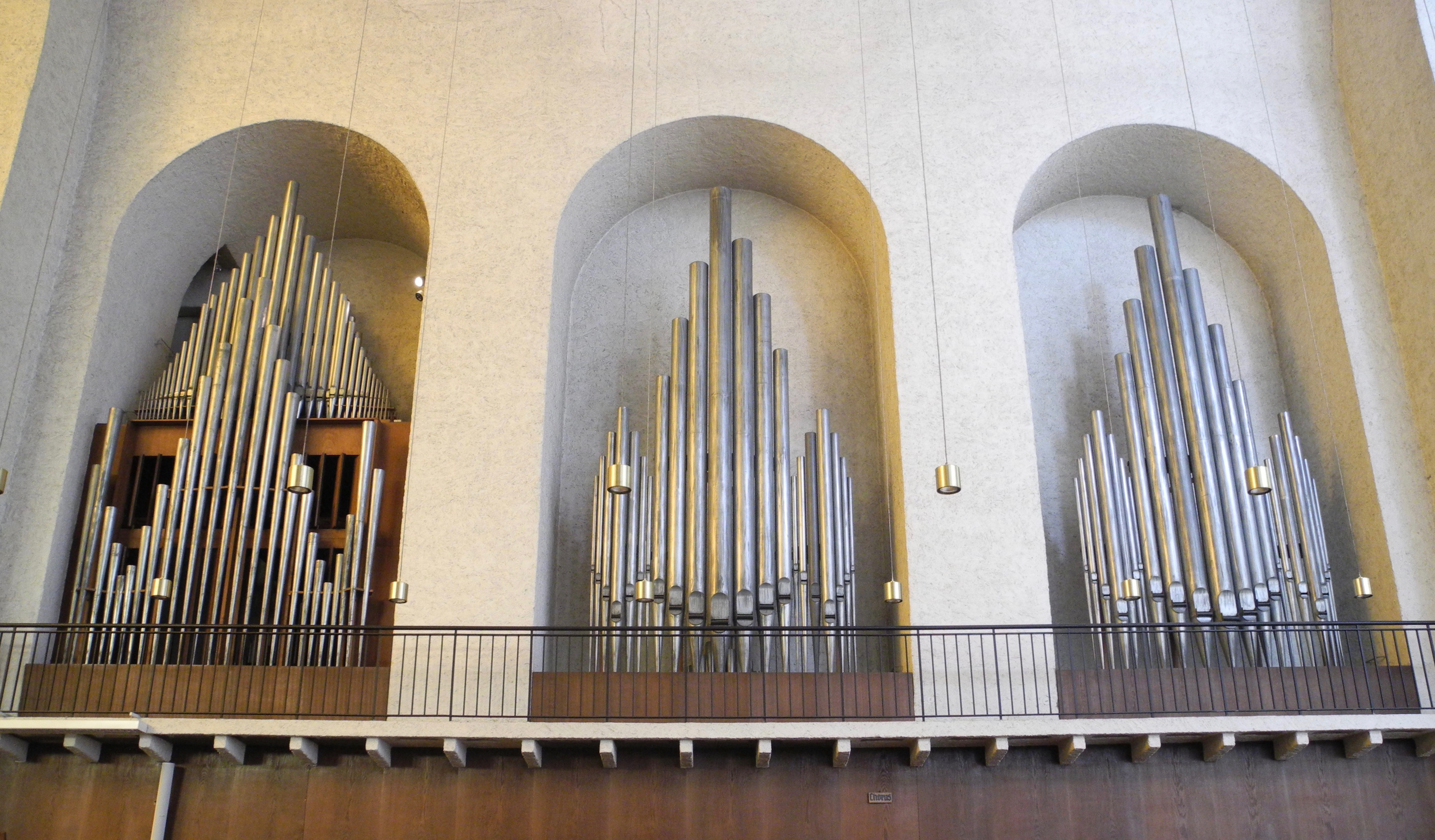 Münsterschwarzach, Kirche (Architekt: Albert Boßlet), Klais 1937 (60/IV/P)